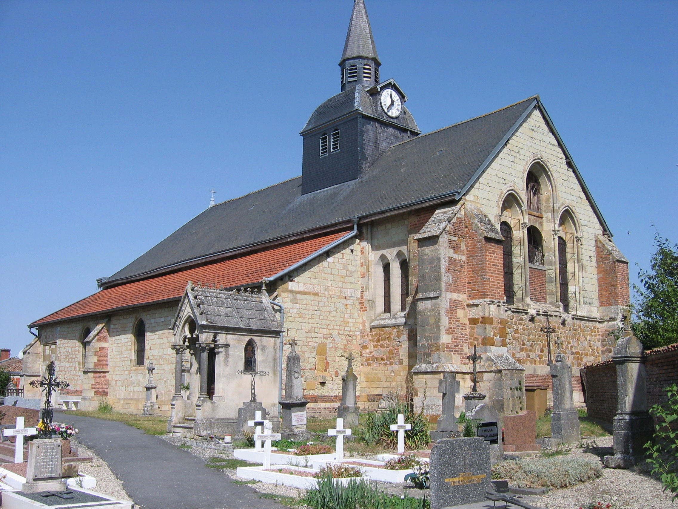 Vue de l'église et du cimetière de Moiremont